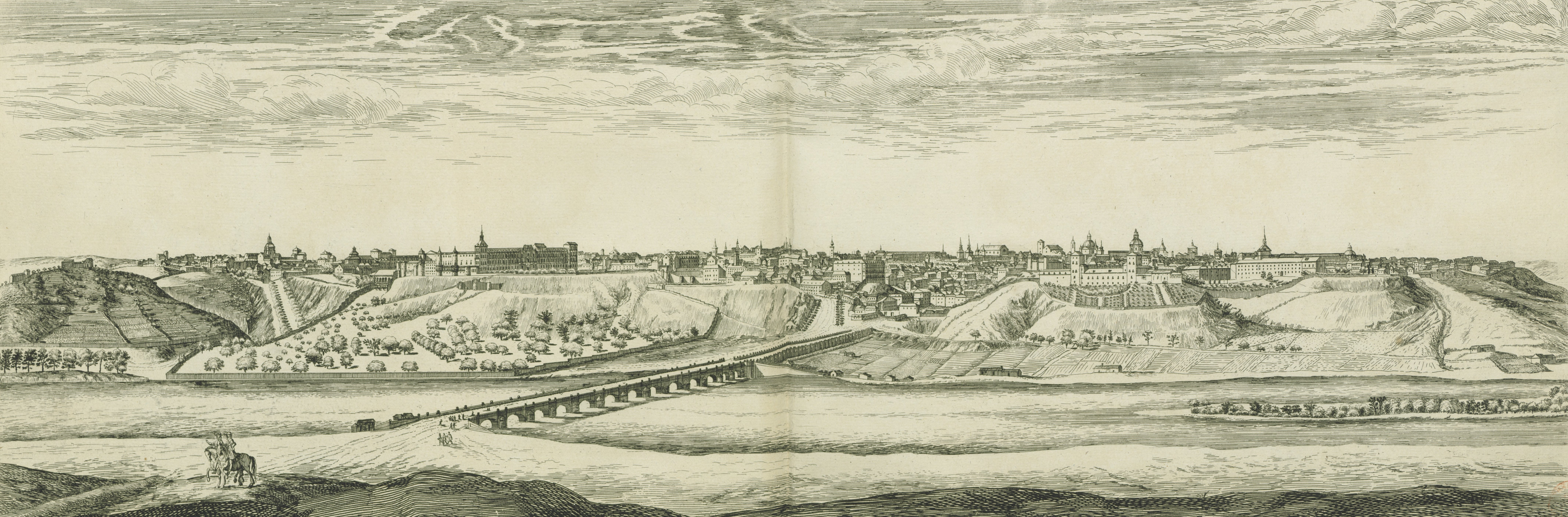 Profil de la ville de Madrid, capitale du royaume d'Espagne.